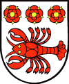 Erb Rakova